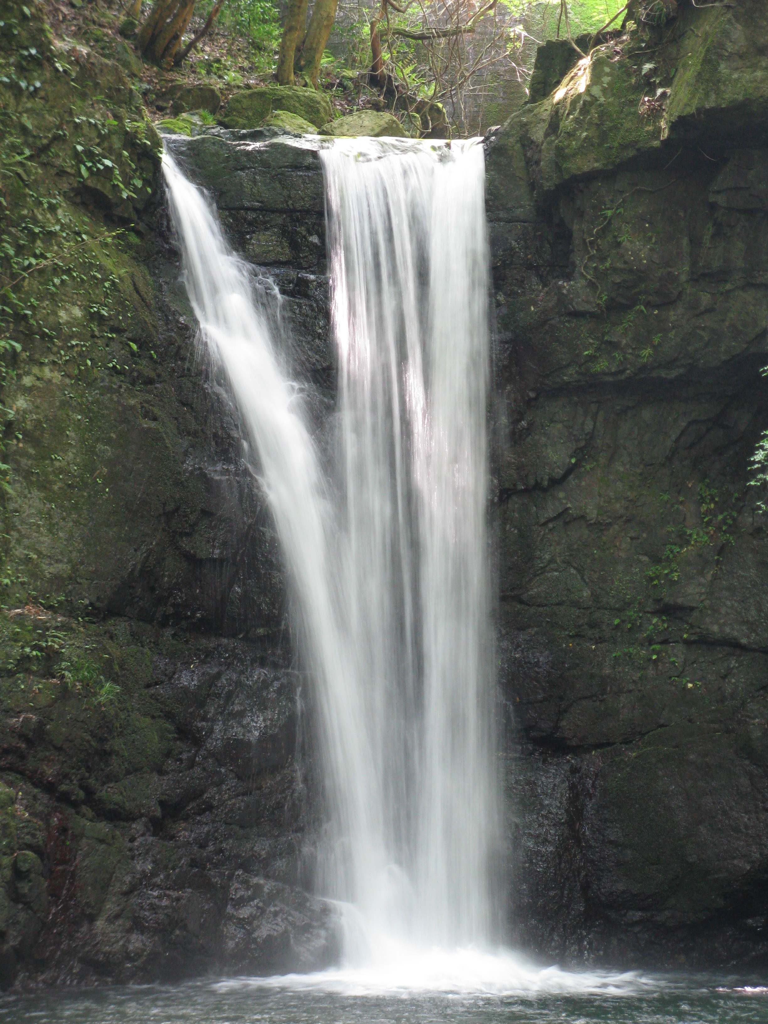 滝畑四十八滝の光滝